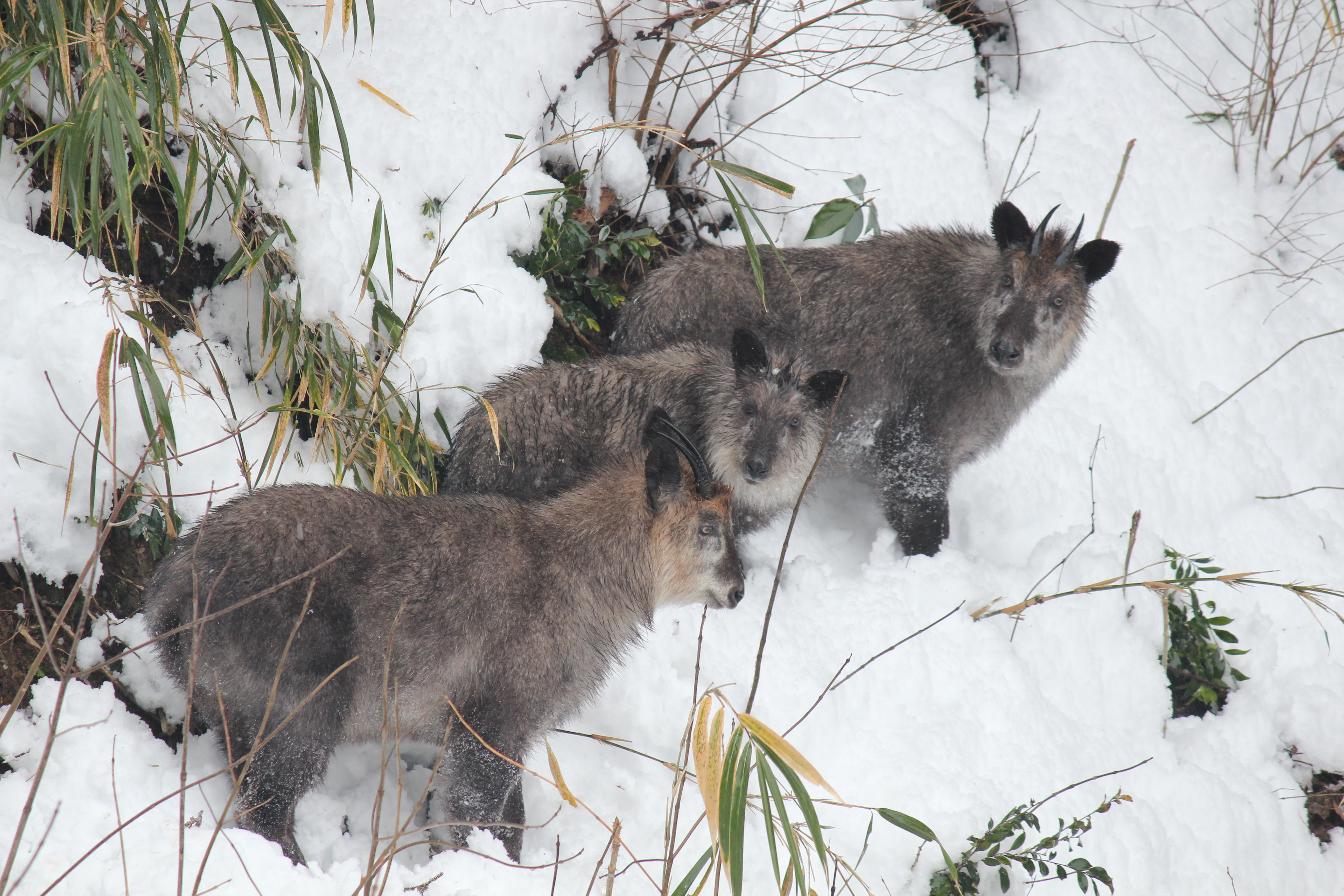 ニホンカモシカの群れ